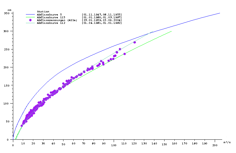 Abflusskurven und Abflussmessungen